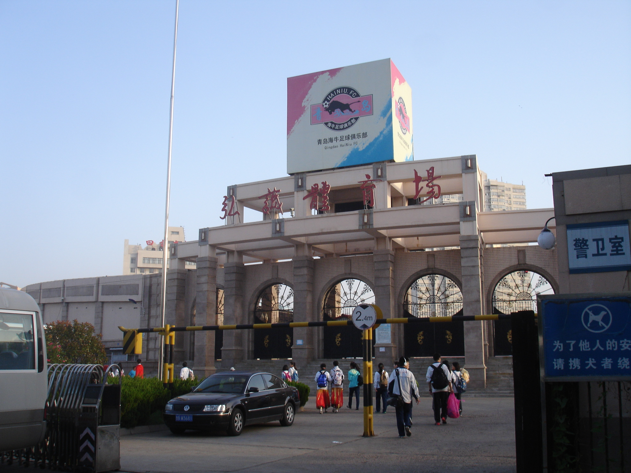 青岛弘诚体育场